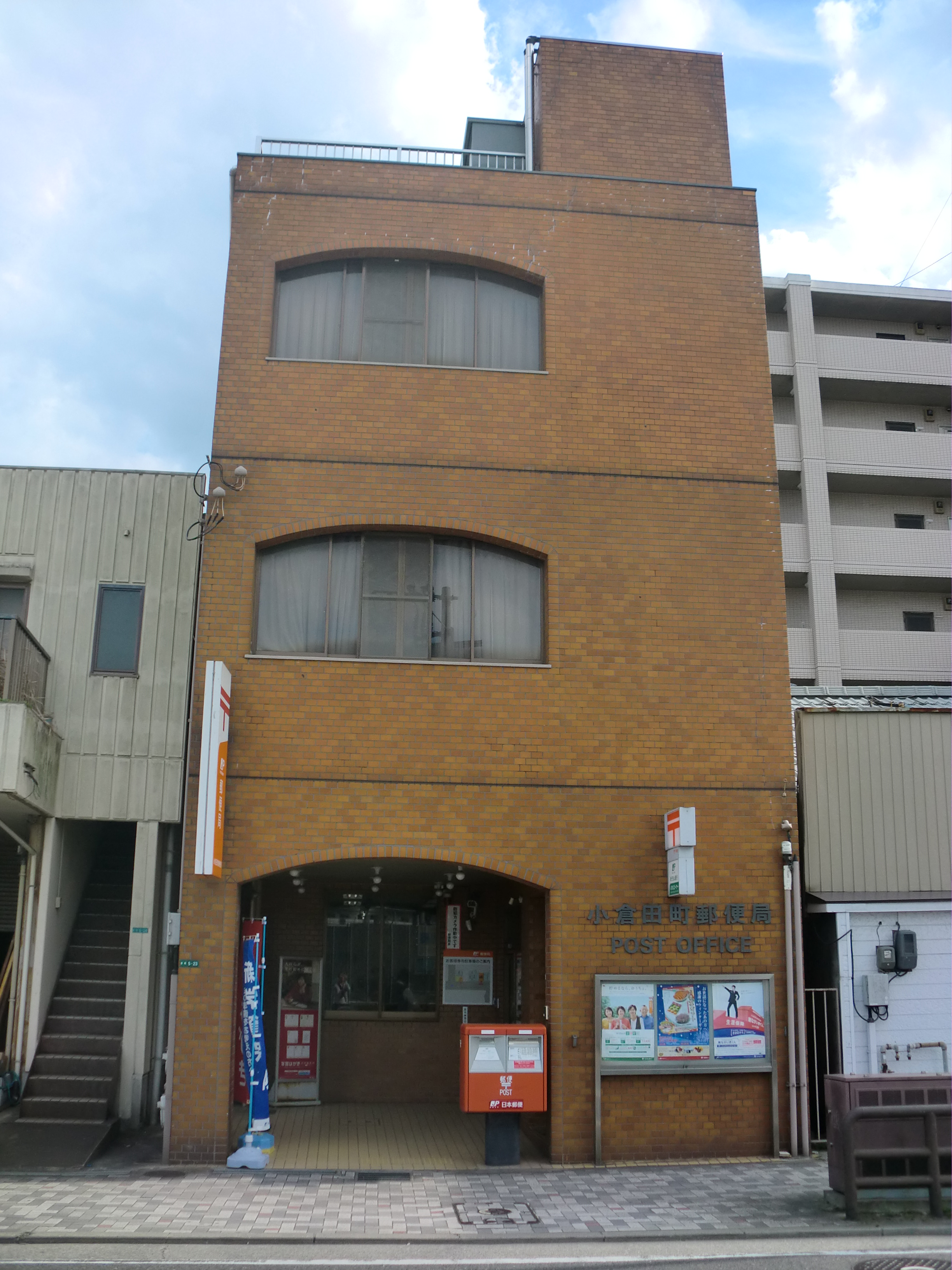 北九州市小倉北区にある小倉田町（こくらたまち）郵便局